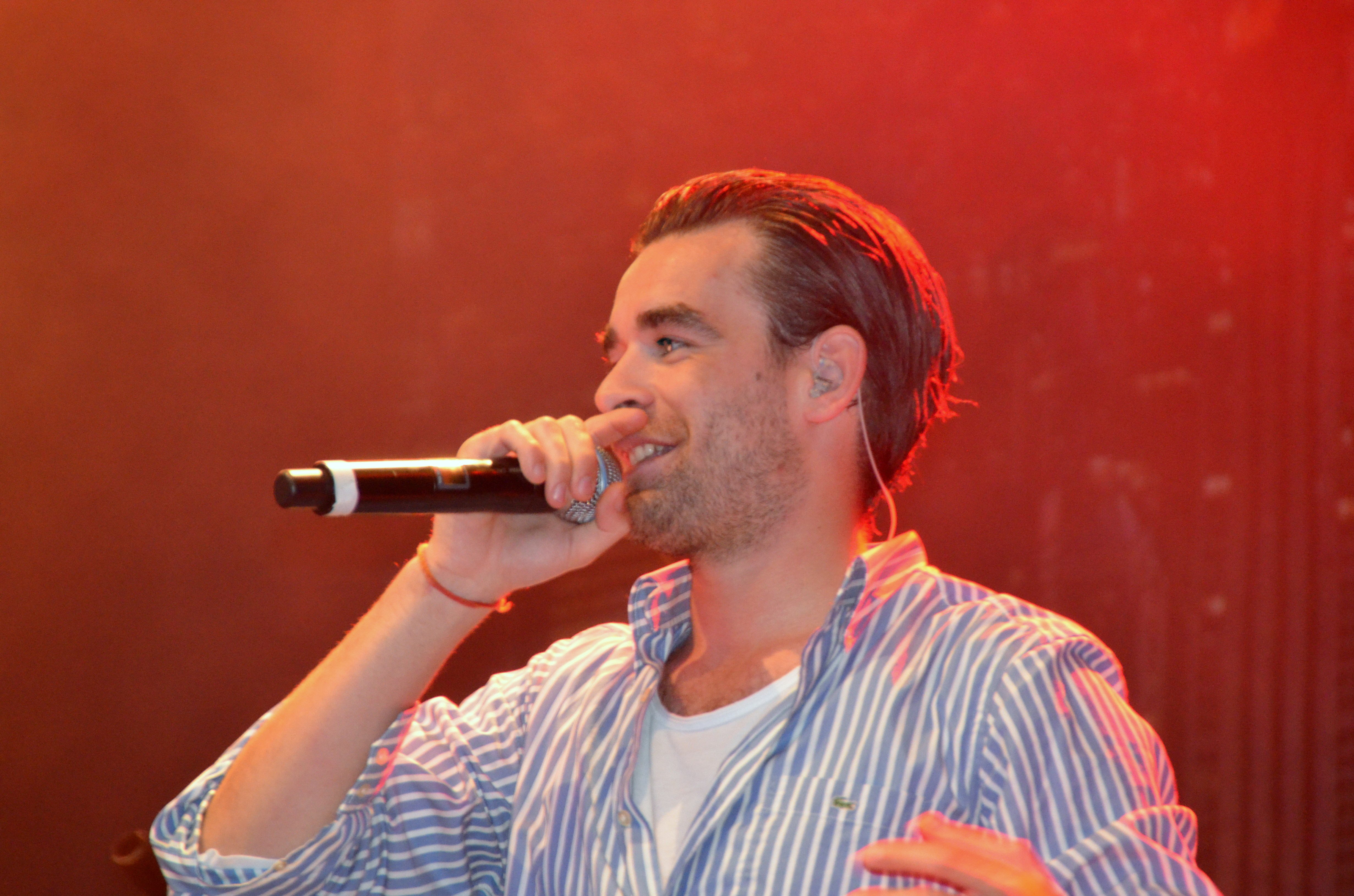 Erik Mortvedt fra Erik og Kriss under en konsert i Langesund i juli 2011.